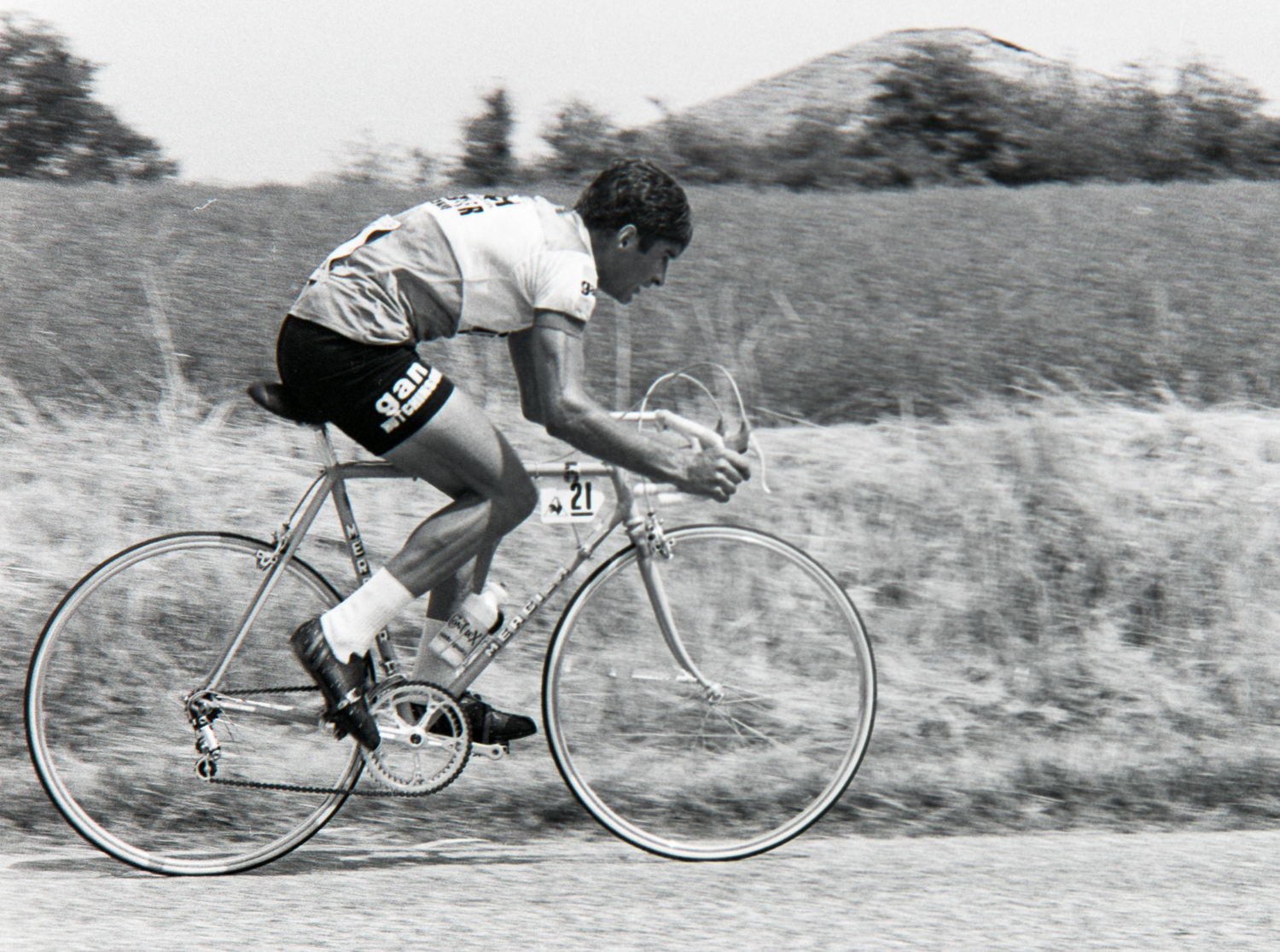 Raymond Poulidor durant le Tour de France 1976. Photographie : René Milanese